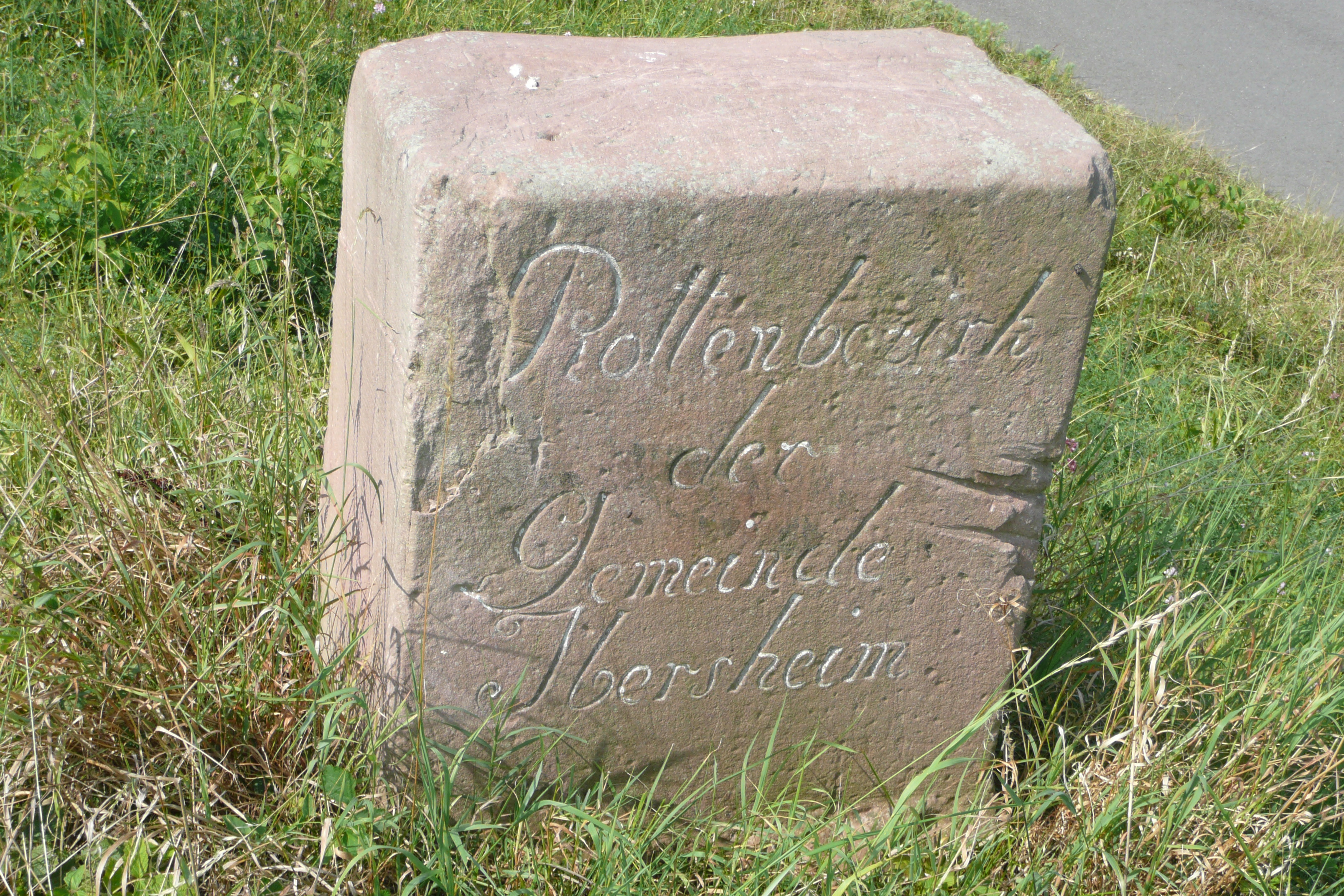 Worms-Ibersheim, Rheinhauptdeich, Grenzstein Rottenbezirk Ibersheim-Rheindürkheim